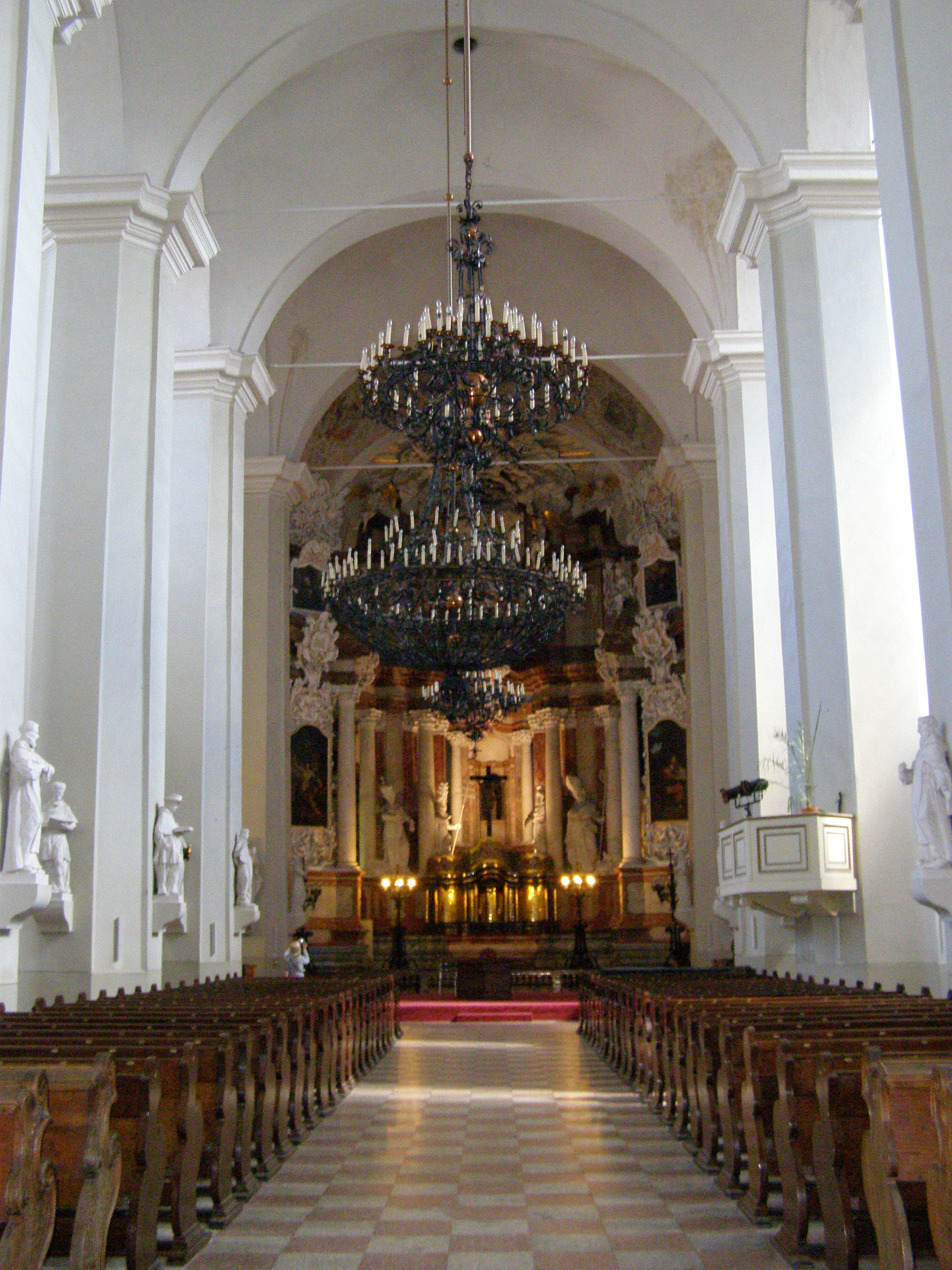 Kościół św. Jana Chrzciciela i św. Jana Ewangelisty w Wilnie